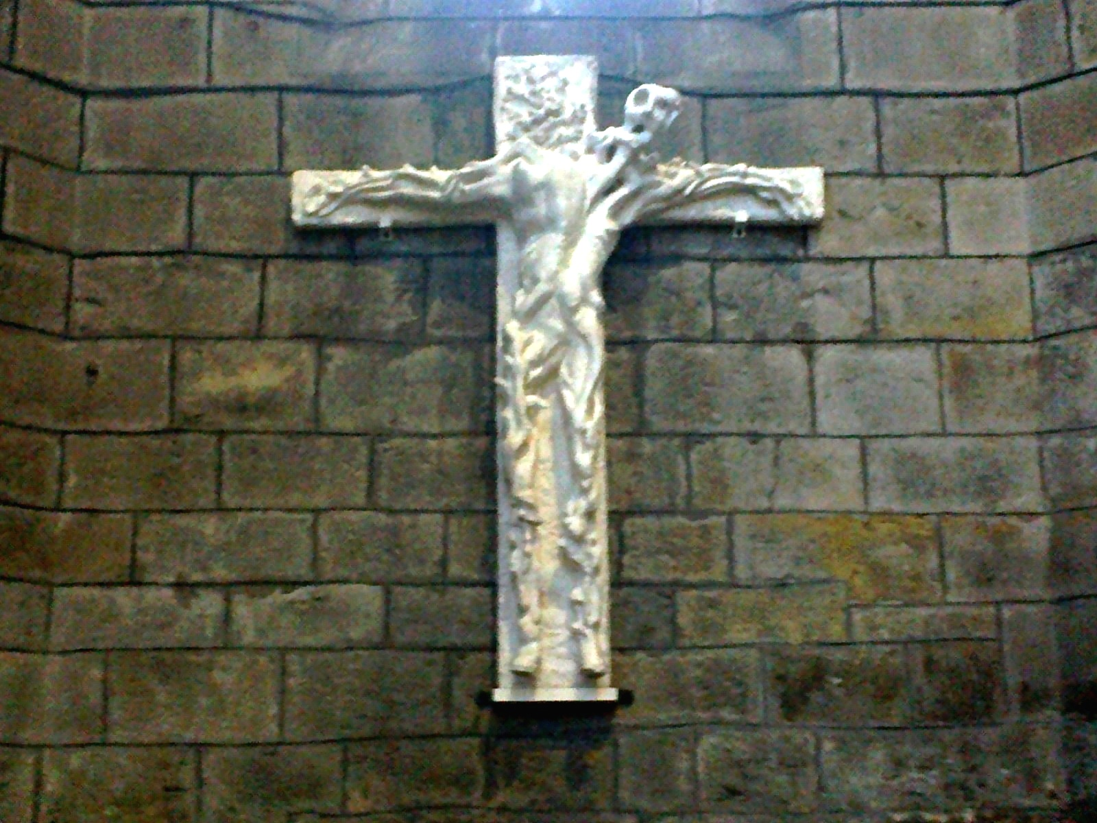 Aveyron Villefranche De Rouergue Eglise Notre-Dame Crucifix Par Genevieve 29052012